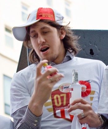 Cássio Ramos